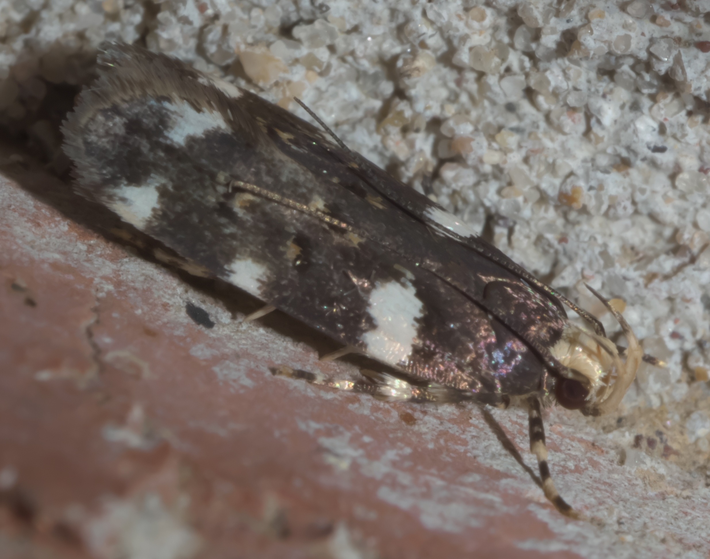 Fascista cercerisella, redbud leaffolder, Size: 7.6 mm, ID Confidence: 90